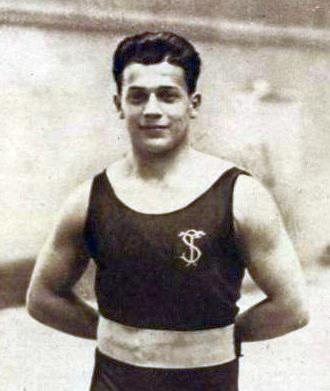 Armand Solbach en 1927.